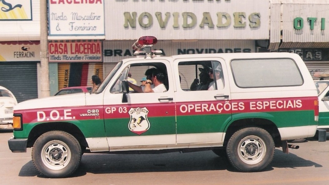 equipe doe